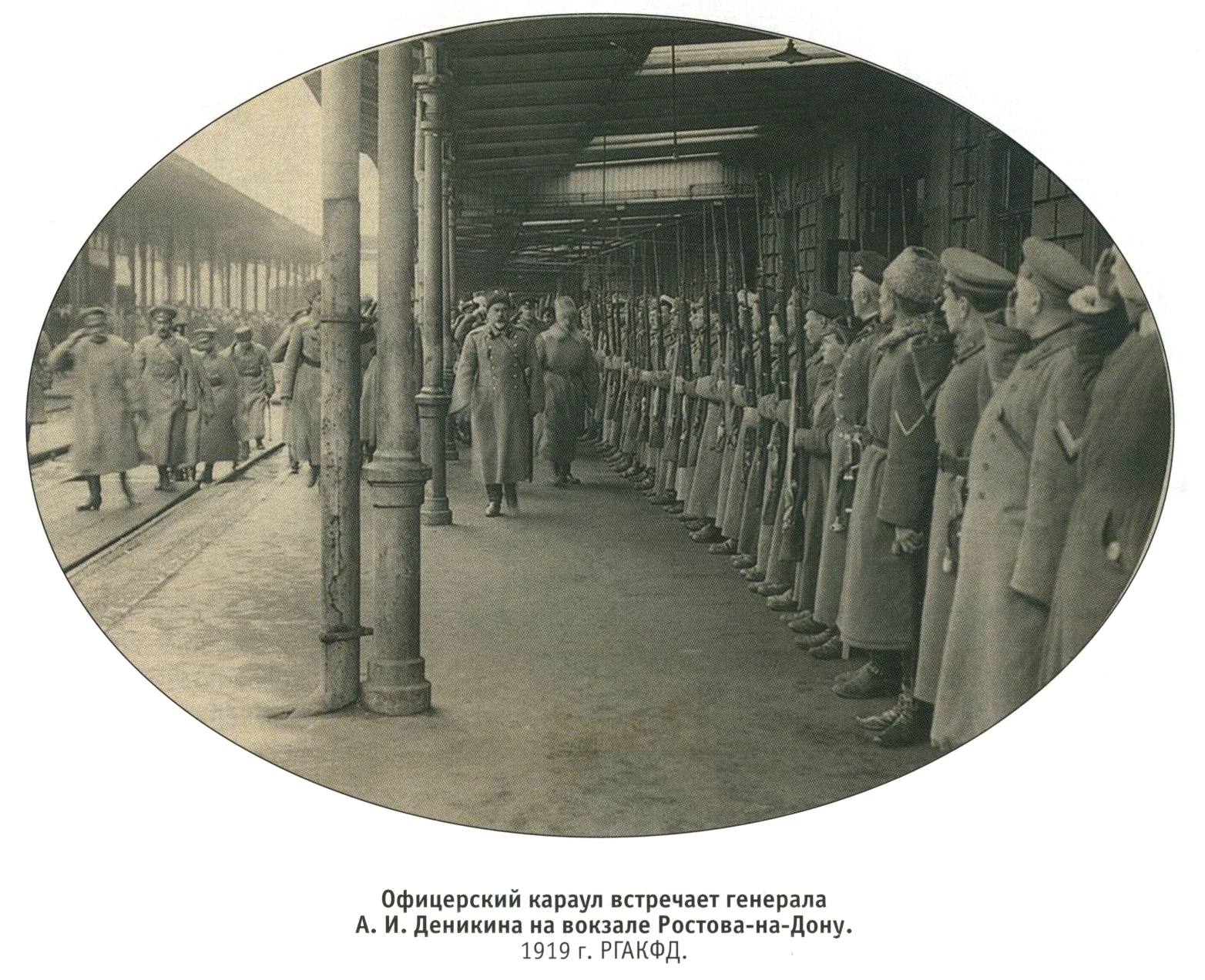 Офицерский караул встречает генерала А.И. Деникна на вокзале Ростова-на-Дону, 1919 год